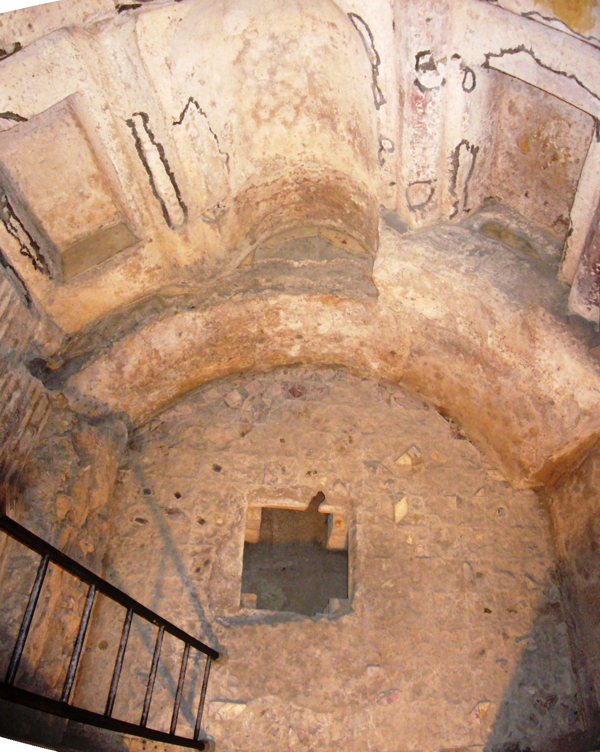 Roma, scavi sotto Santa Maria Maggiore: ambiente con nicchie